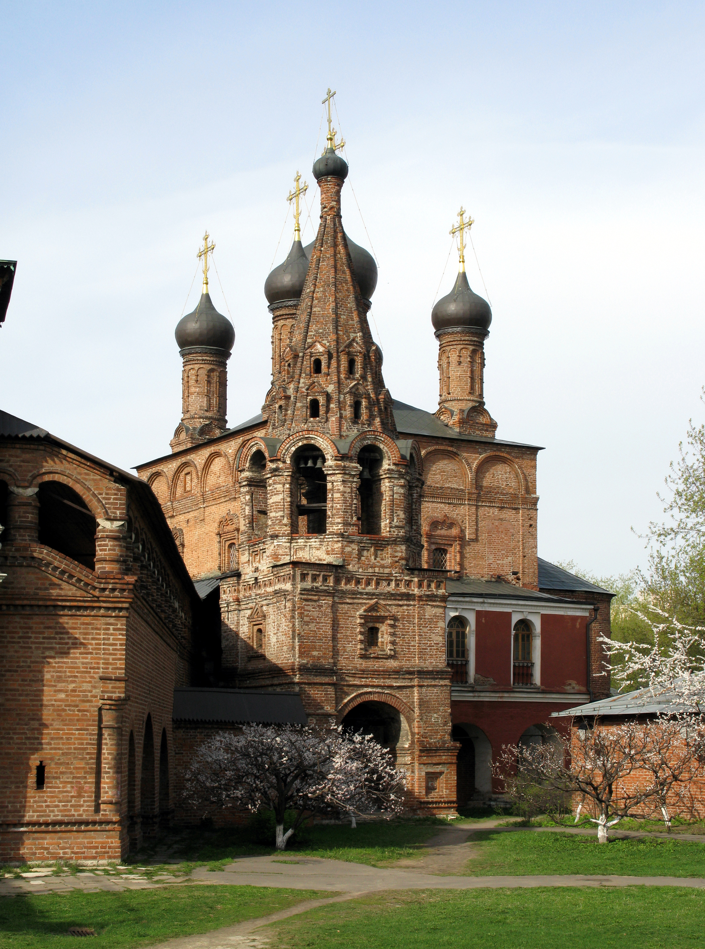 Крутицкое Патриаршее подворье (Собор Успения Пресвятой Богородицы, колокольня)